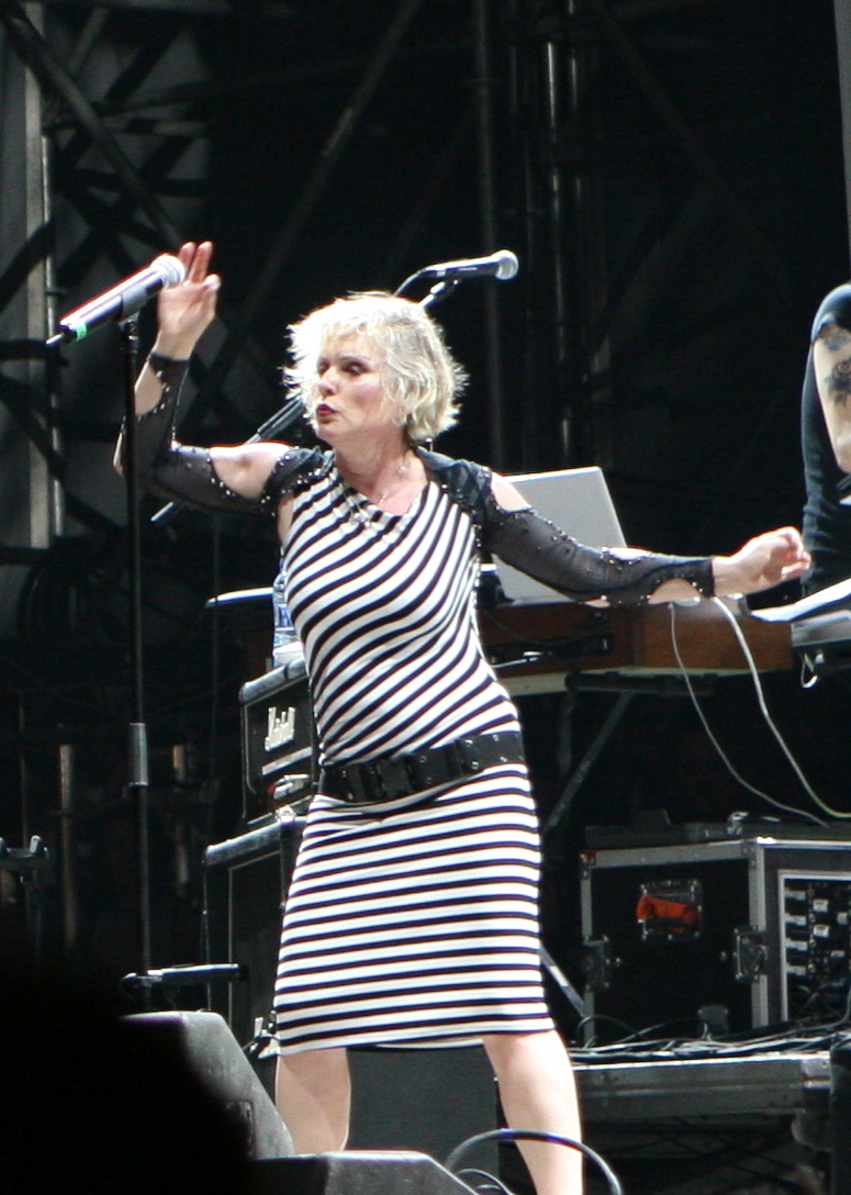 Deborah Harry